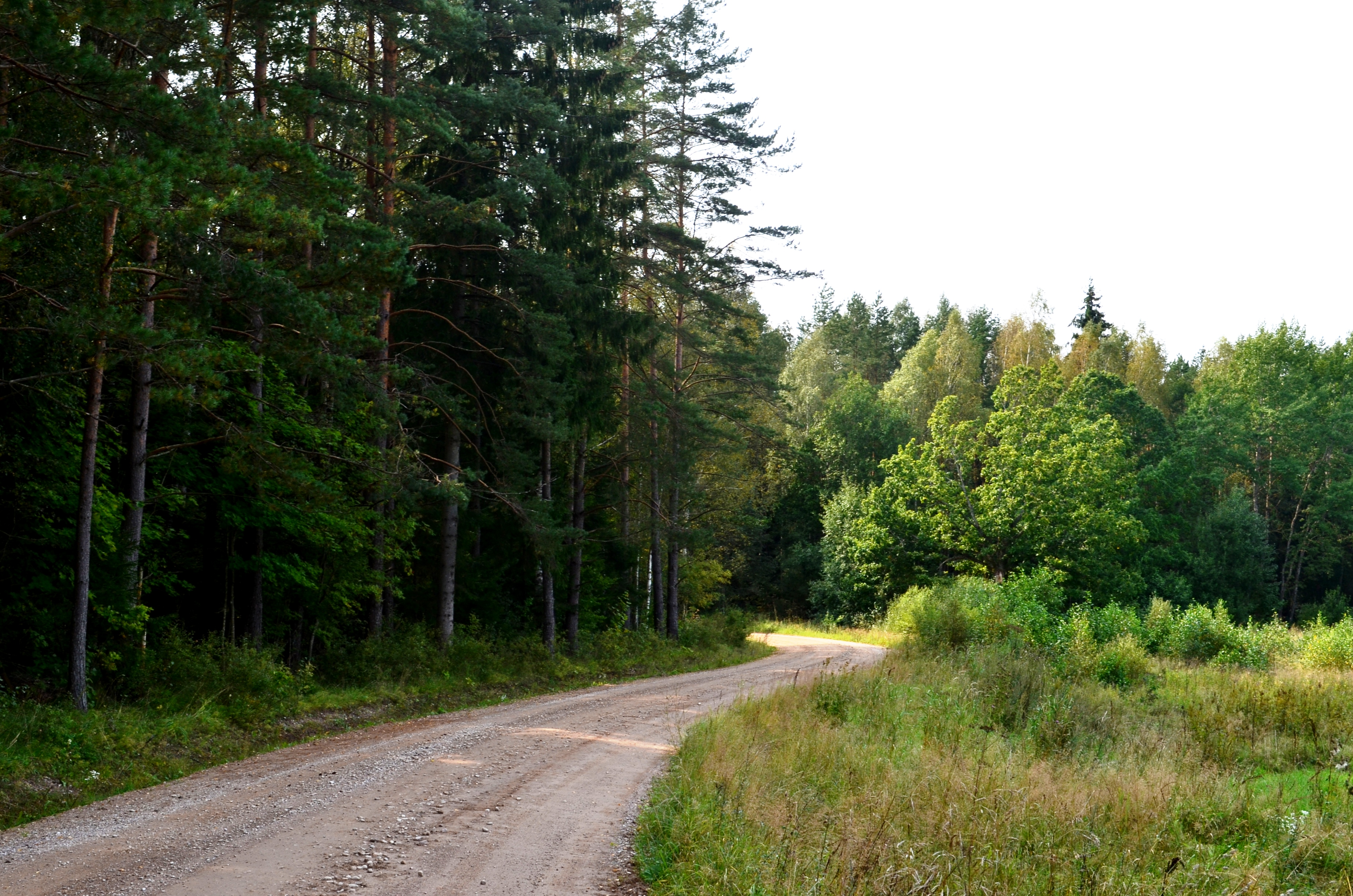 Uosininkų miškas (Nemenčinės-Lavoriškių miškai), Mickūnų sen., Vilniaus raj.